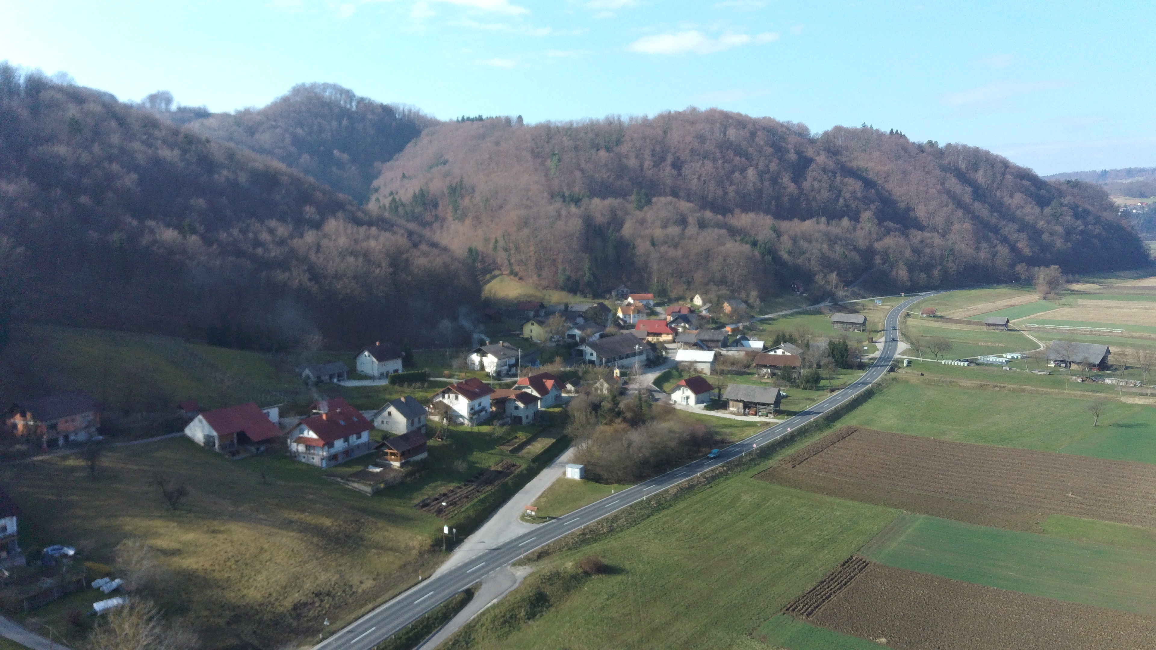 Gornje Pijavško iz zraka